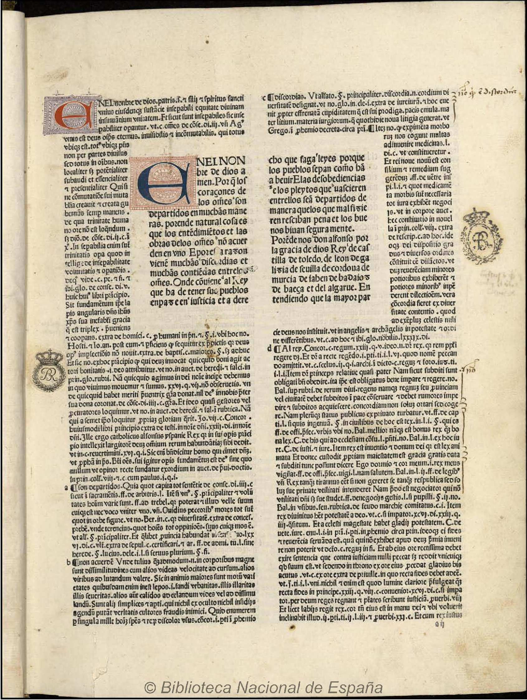 Fuero Real de Castilla, con la glosa latina de Alfonso Díaz de Montalvo Autor: Díaz de Montalvo, Alfonso (1405-1499) Fecha: 1483 Datos de edición: [Sevilla] [Alfonso del Puerto]